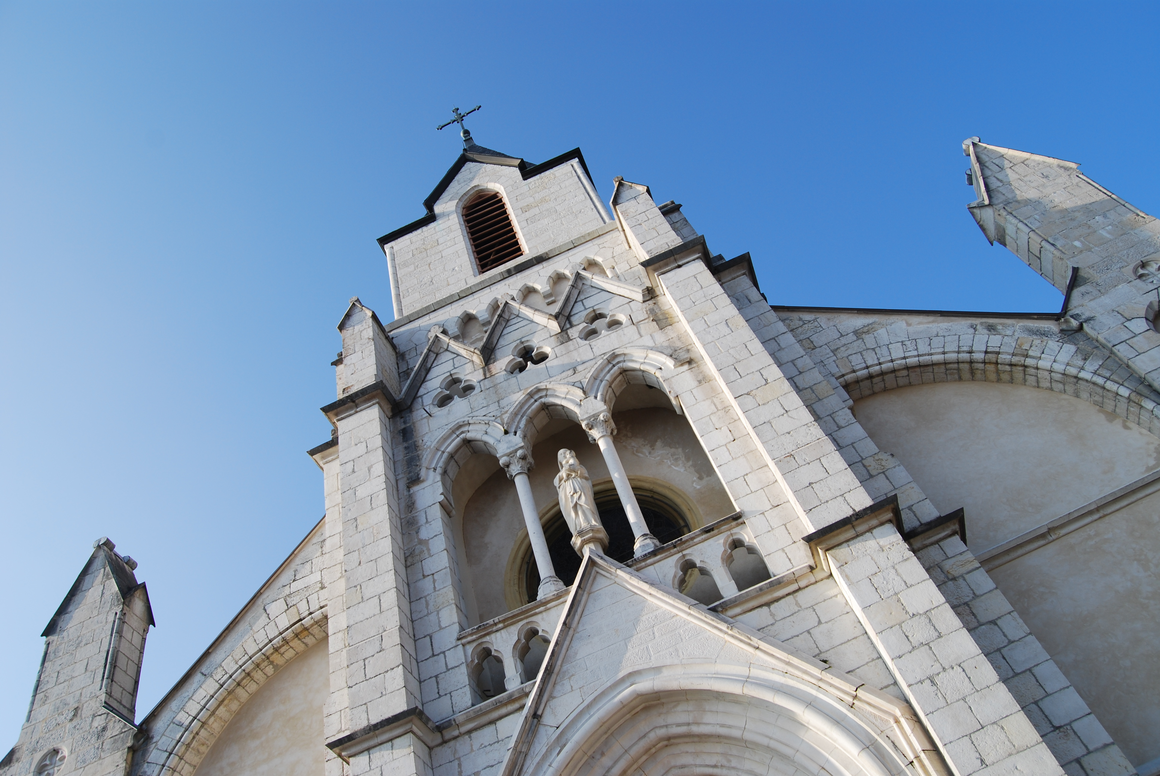 Façade de l'église de Gex, département de l'Ain, France.